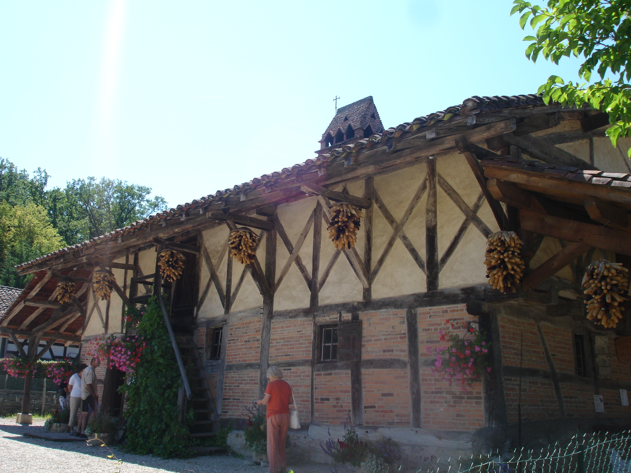 Ferme typique incluse dans l'espace des pays de Bresse à Saint-Etienne-du-Bois (Ain)